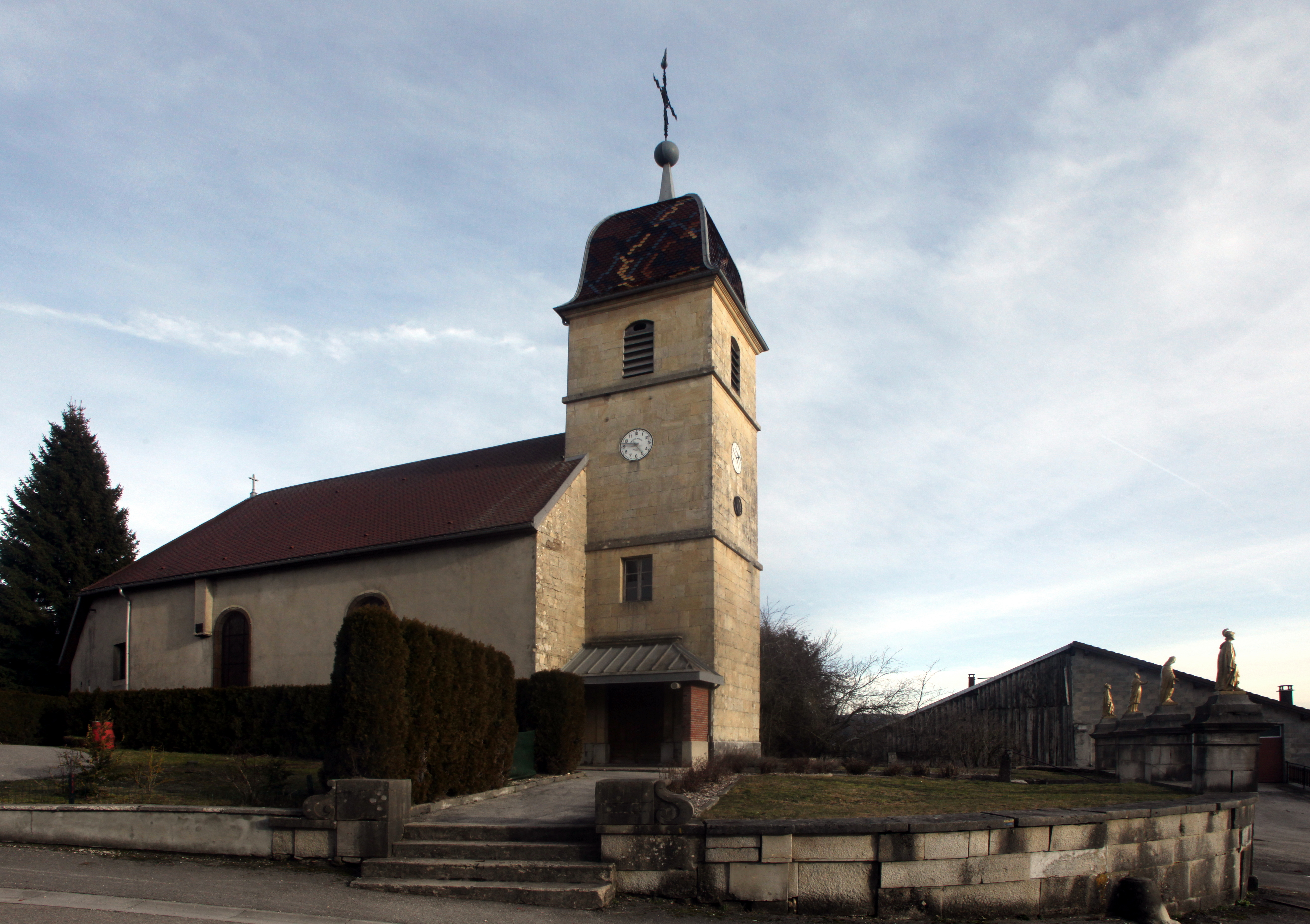 Eglise de Vuillecin (Doubs).